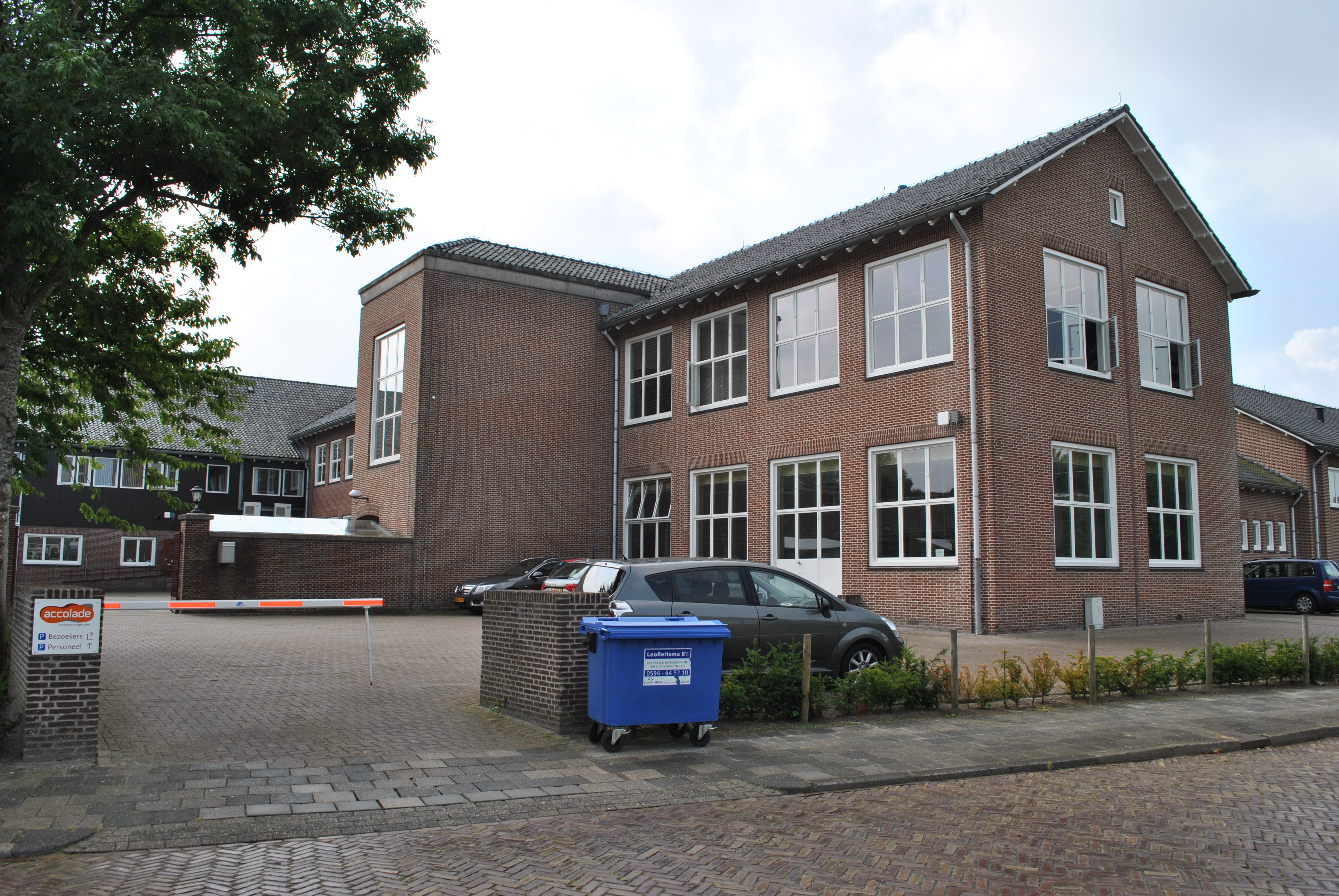 Rijkskweekschool Heerenveen